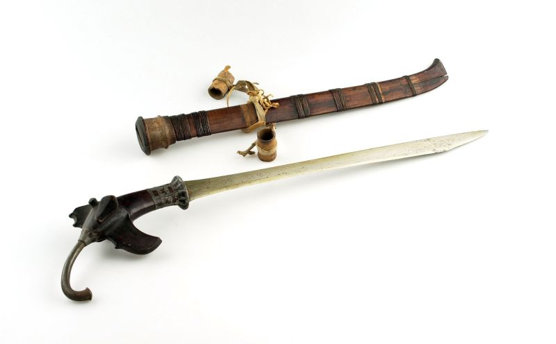 Zwaard. Zwaard met houten greep en houten schede Unknown language: Foda Nioio gari Gari